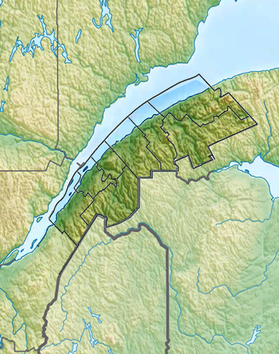 Carte topographique de la région administrative du Bas-Saint-Laurent.